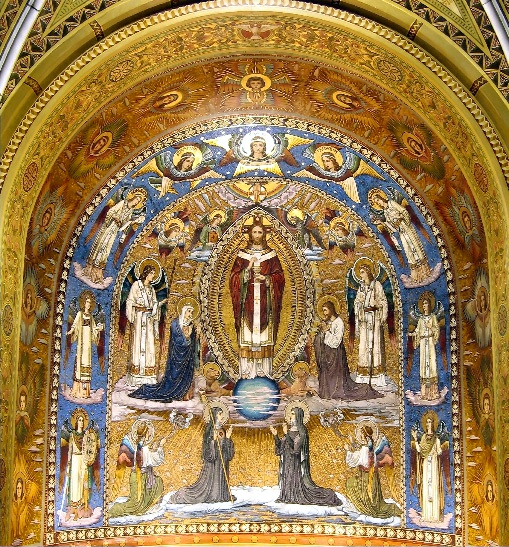 Max Schmalzl, Christusmosaik, Kloster Clyde Missouri